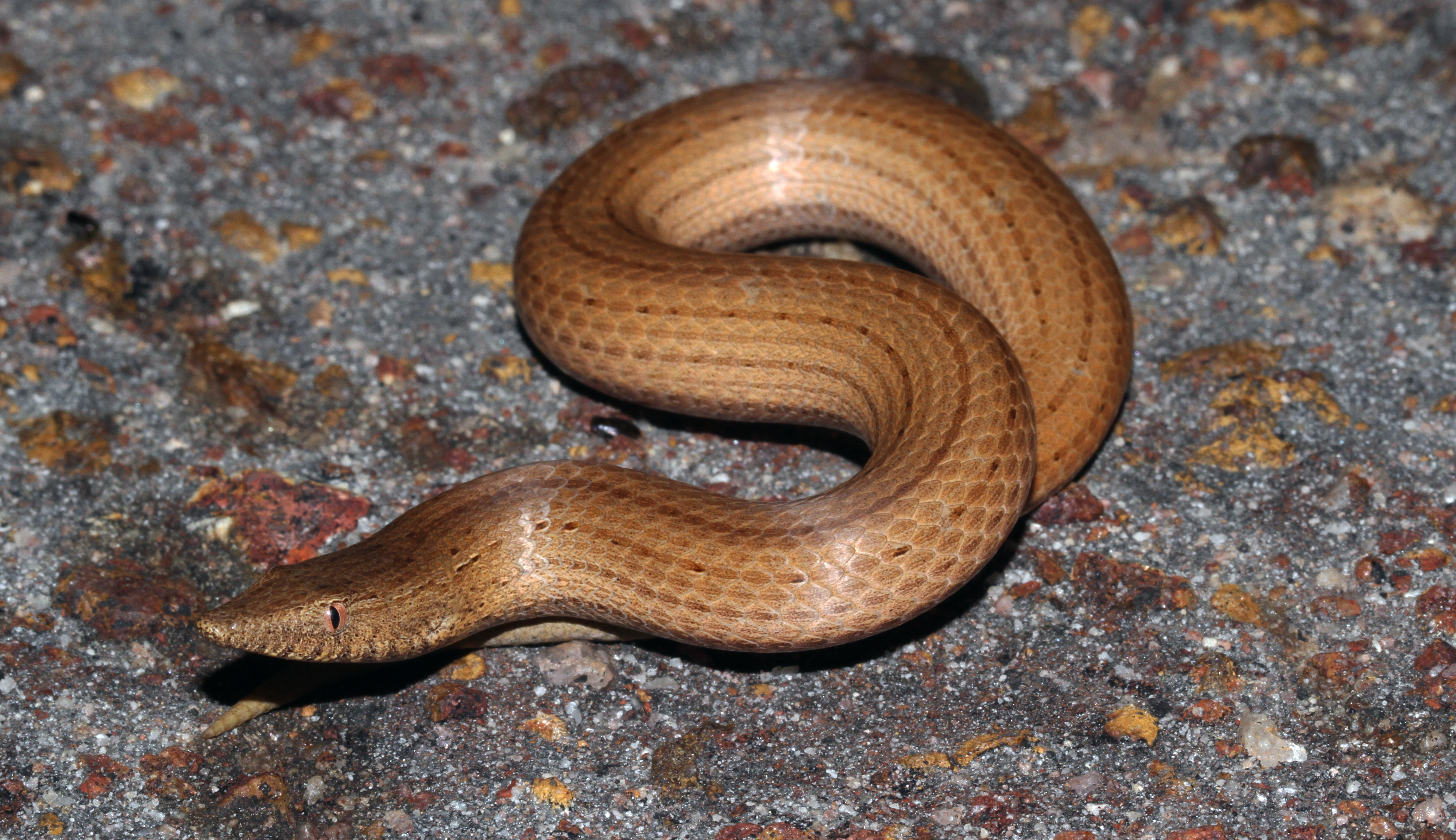 Kakadu NT